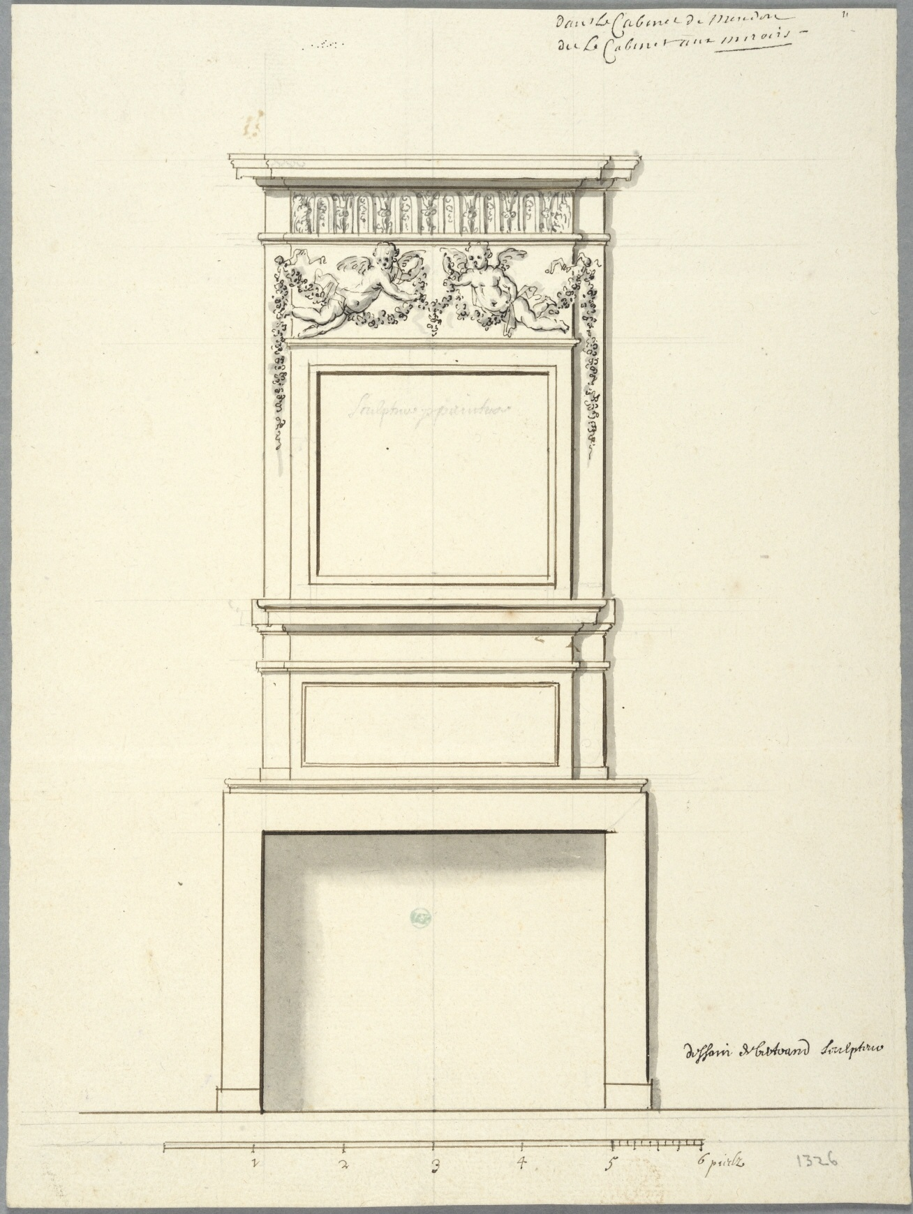 Projet de cheminée du cabinet des miroirs de Meudon, vers 1680 ?